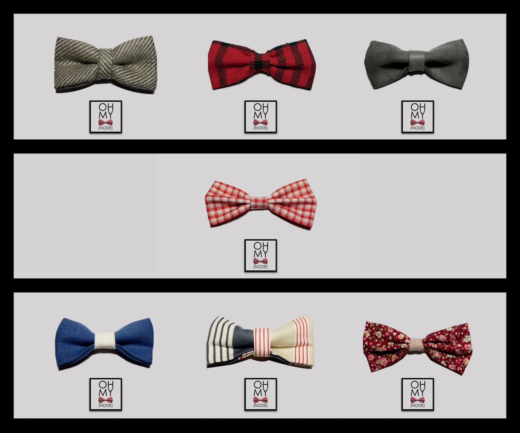 Collection février 2013 for Oh My Node